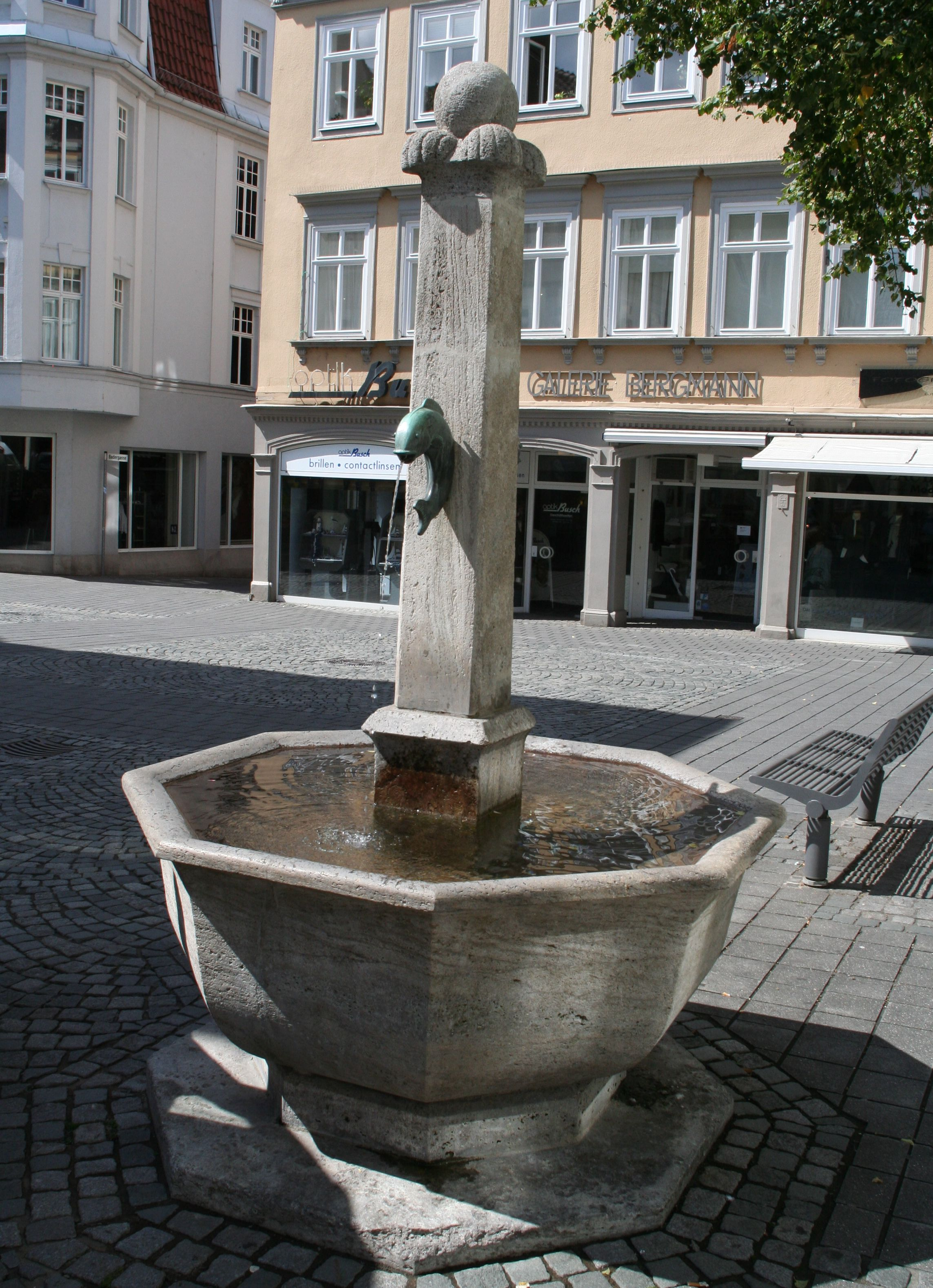 Brunnen im unteren Bürglaß in Coburg